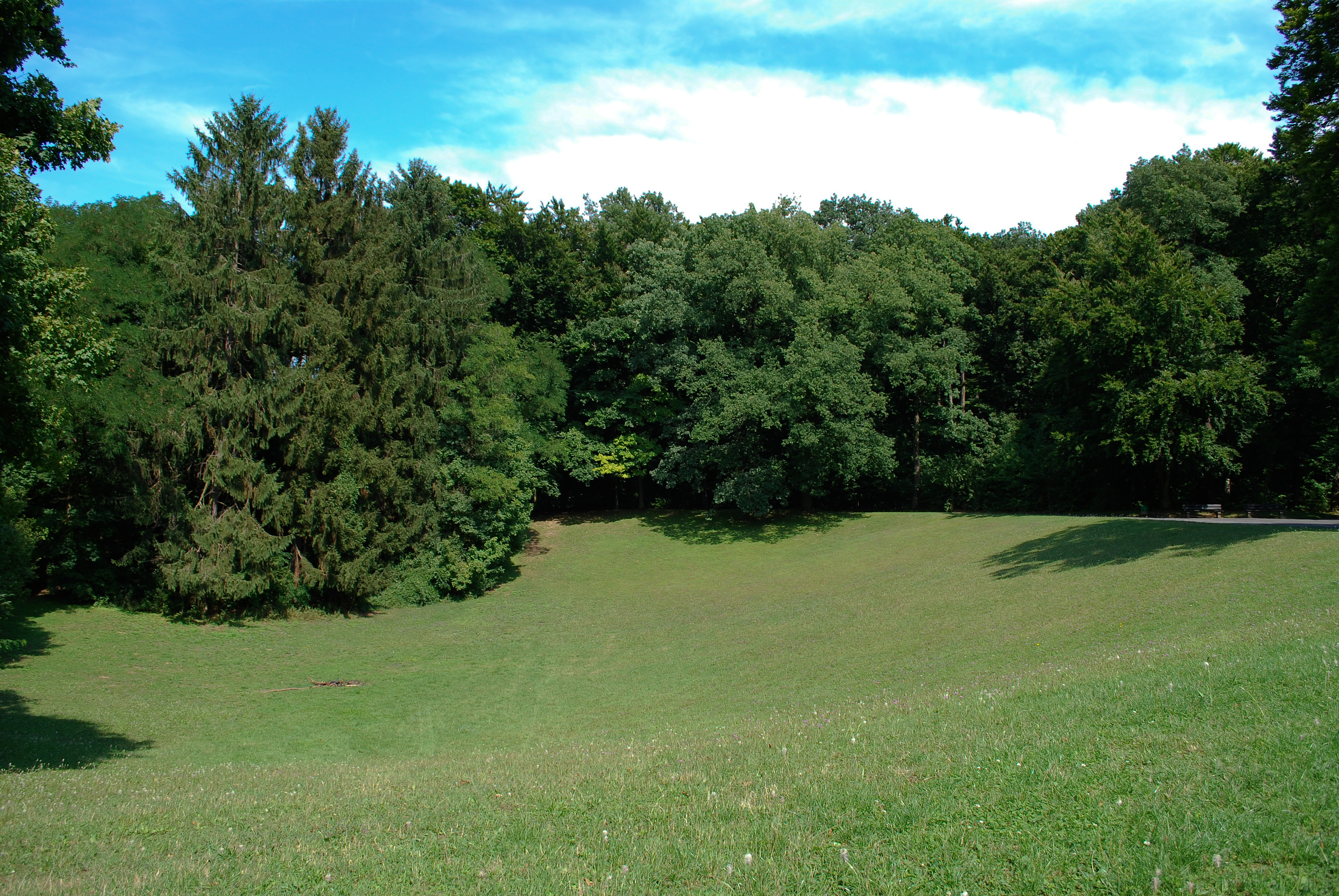 Leonhard-Eißnert-Park in Offenbach am Main - „Suppenschüssel“